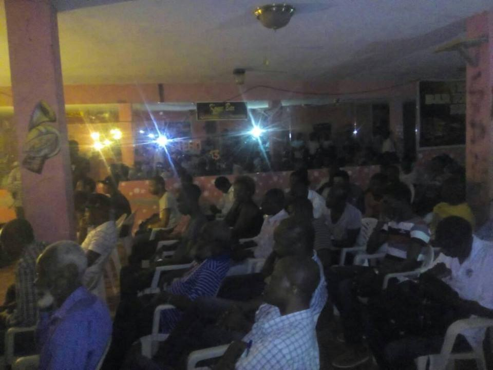 Forum public sur le Budget 2017-2018 a Tabarre du parti politique Bourad pou remete Ayiti debou, le dimanche 22 octobre 2017. Le parti a qualifié le budget étant un budget criminel qui a pour principal but de surtaxer les plus pauvres.